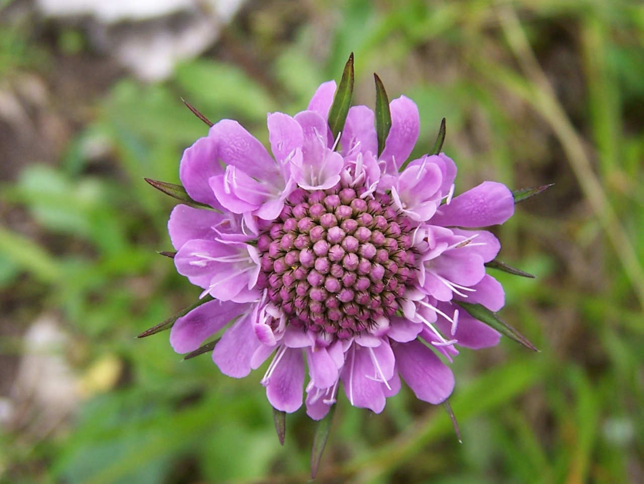 Scabiosa lucida (pl. driakiew lśniąca)